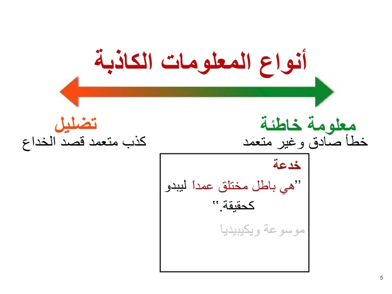 .الفرق بين المعلومة الخاطئة والتضليل والخدعة